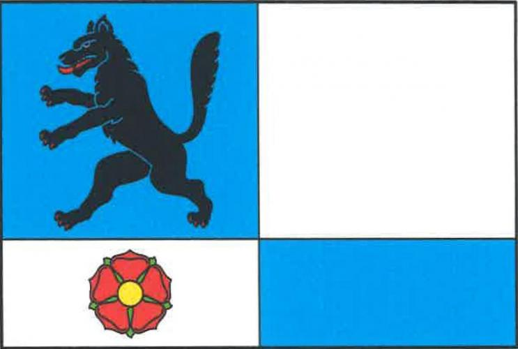 Kvítkov vlajka